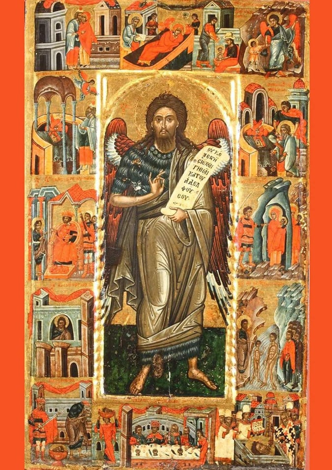 Joan Pararendësi dhe Pagëzori. Kremtohet më 7 Janar.